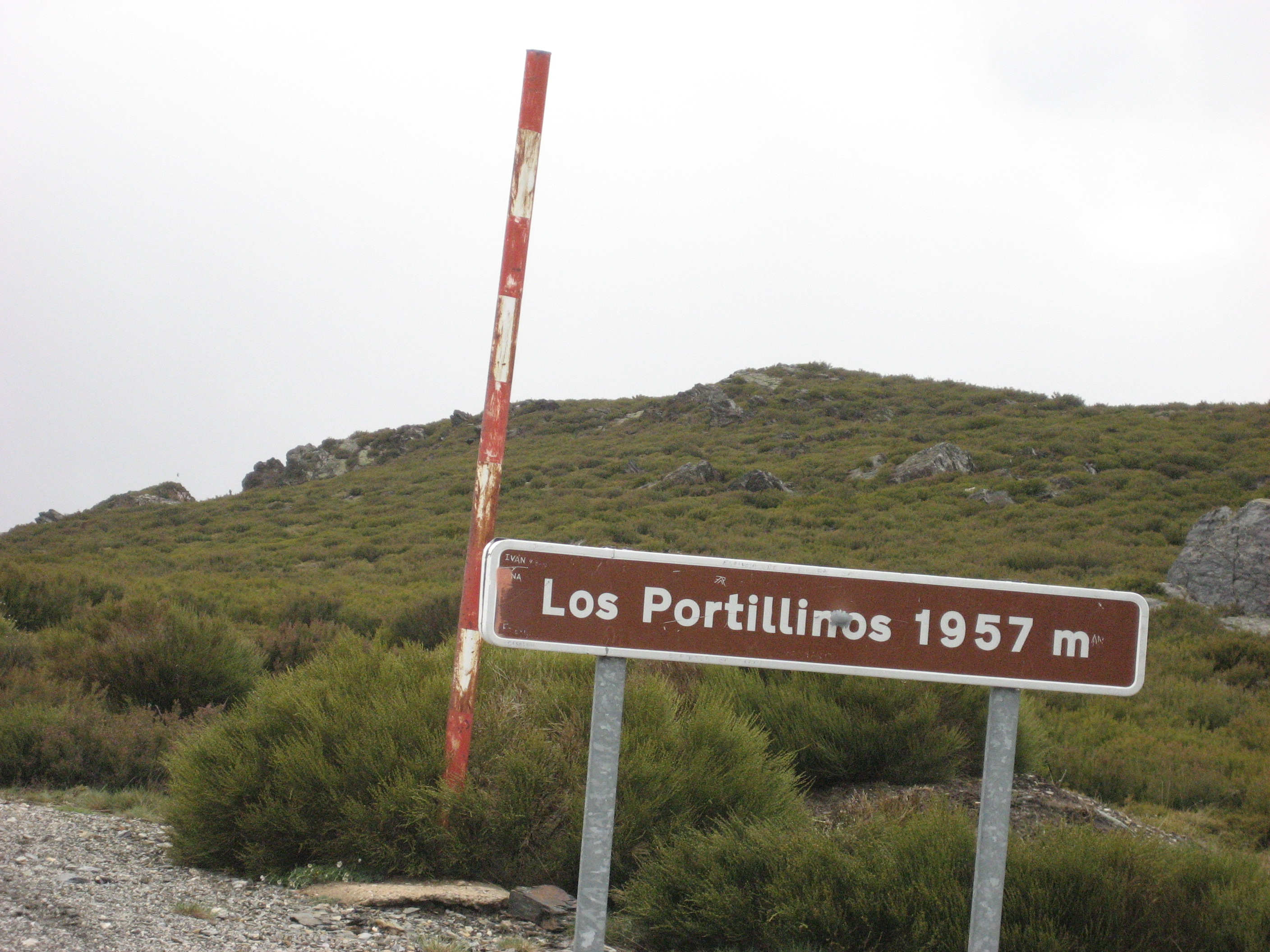 Puerto de Los Portillinos entre La Cabrera y El Bierzo (León, España)